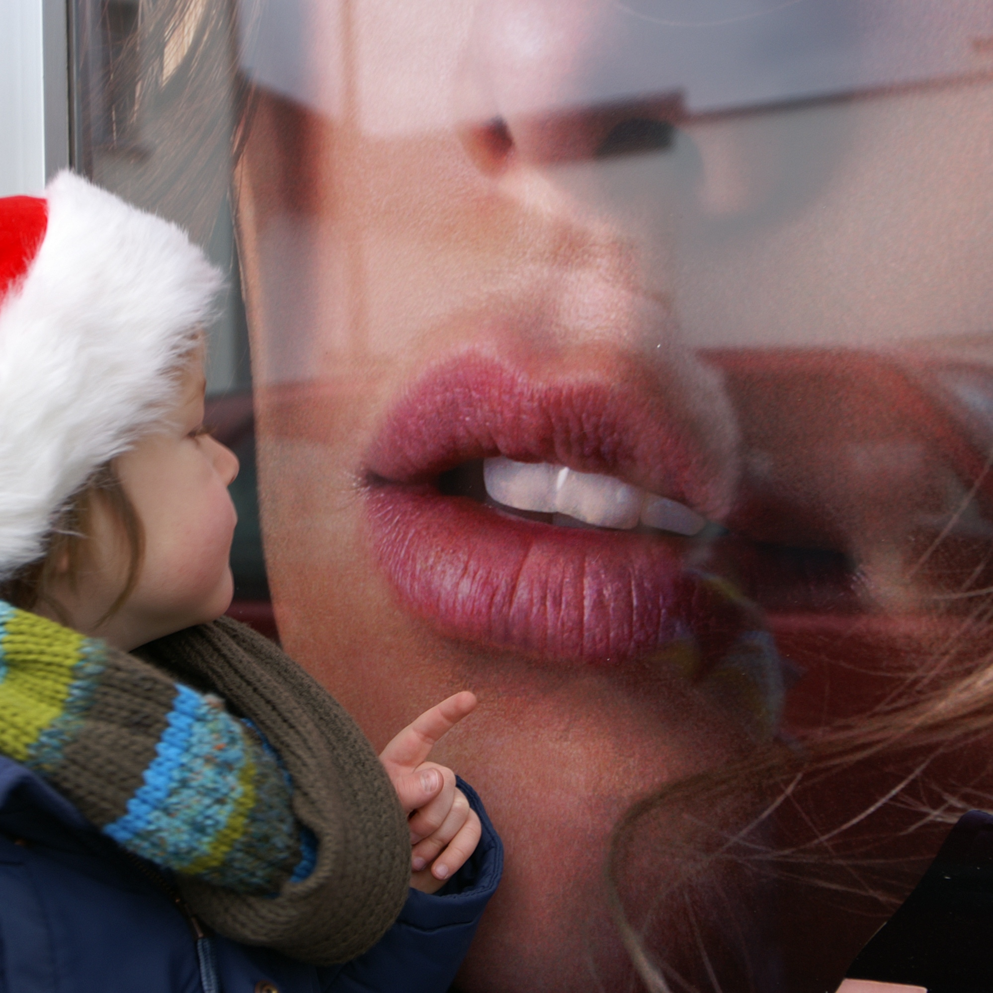 Weihnachtsverlockung Schaufensterwerbung sinnliche Lippenkonfrontation in der Fussgängerzone Dornbirns